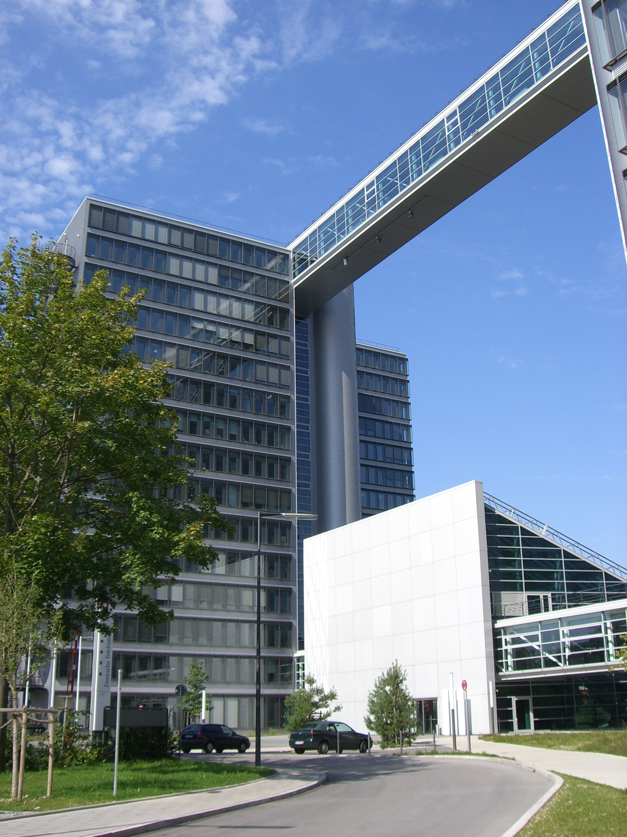 München - TenTowers Telekom Center München (Sky Bridge).jpg